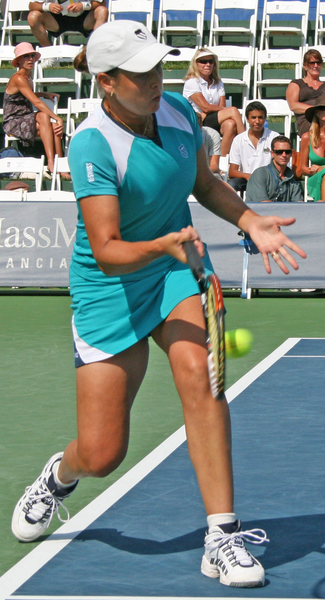 Imatge de Liezel Huber l'any 2007.